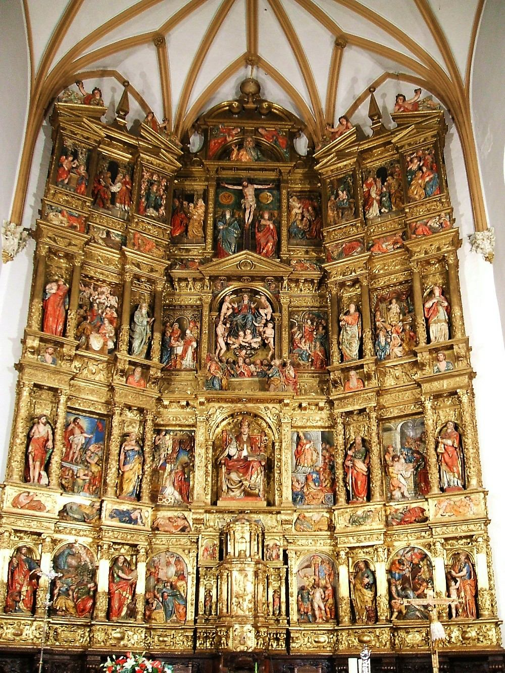 Retablo Mayor renacentista (S-XVI) de la Iglesia de Santa María, Valtierra, Navarra, España